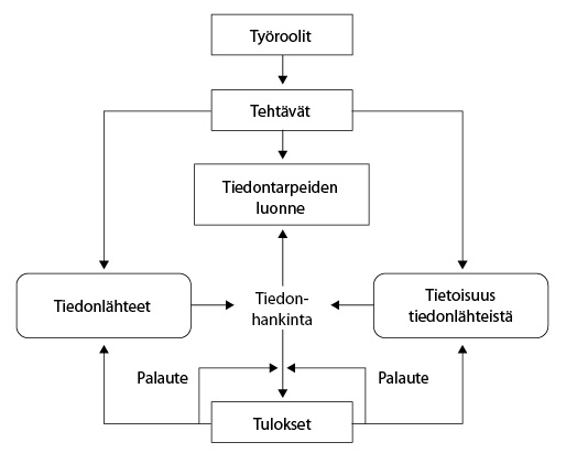 Leckie & Pettigrew: Ammatillisen tiedonhankinnan yleismalli